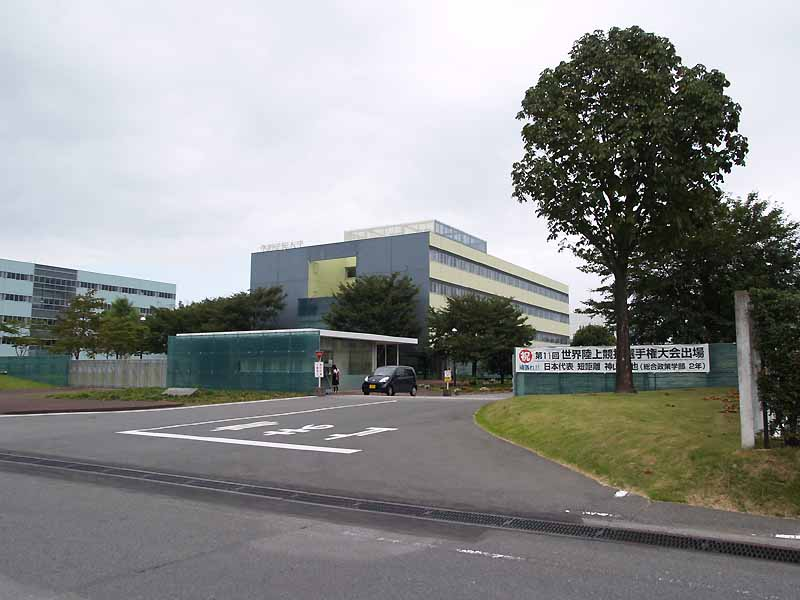 作新学院大学清原キャンパス